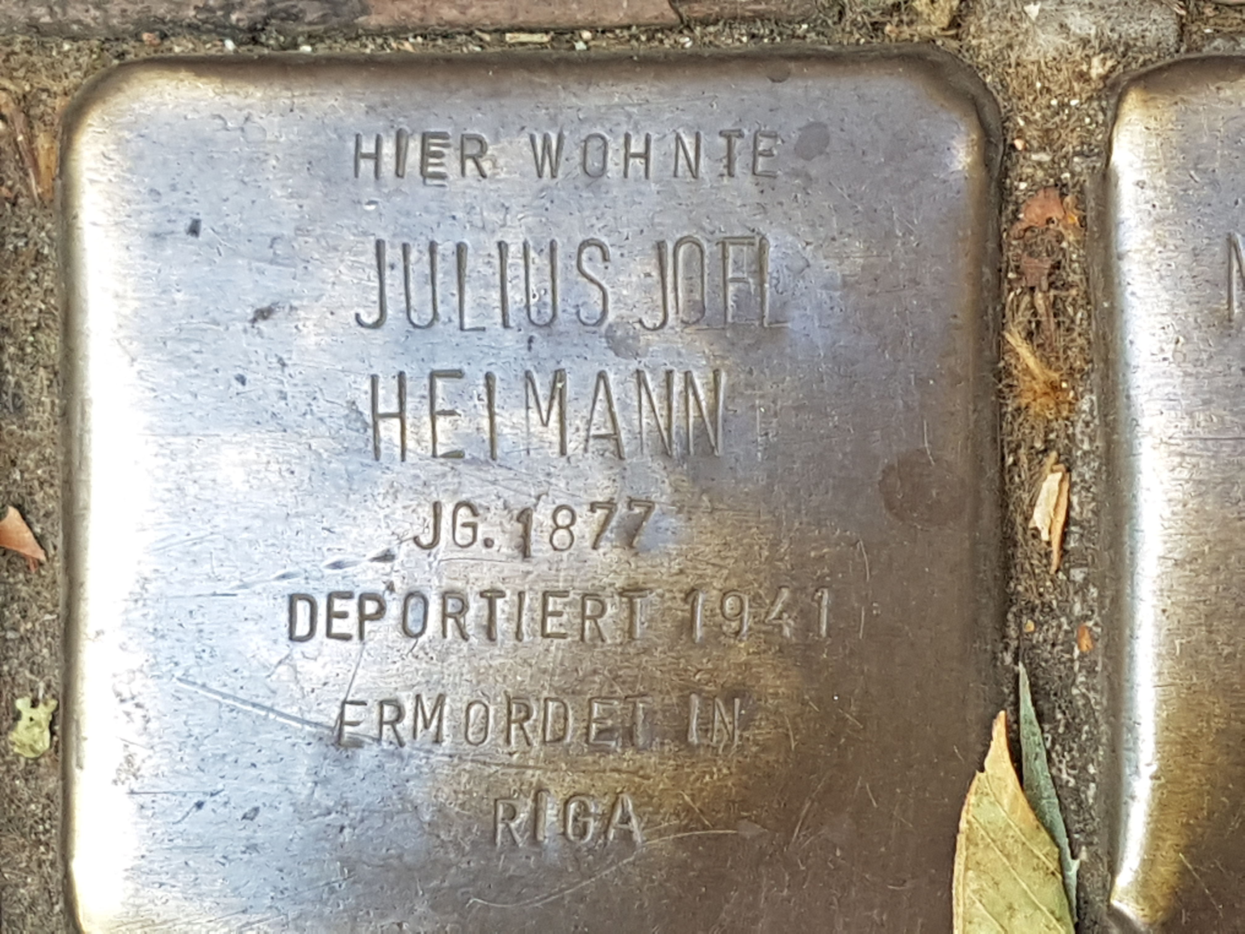 Stolperstein Duisburg